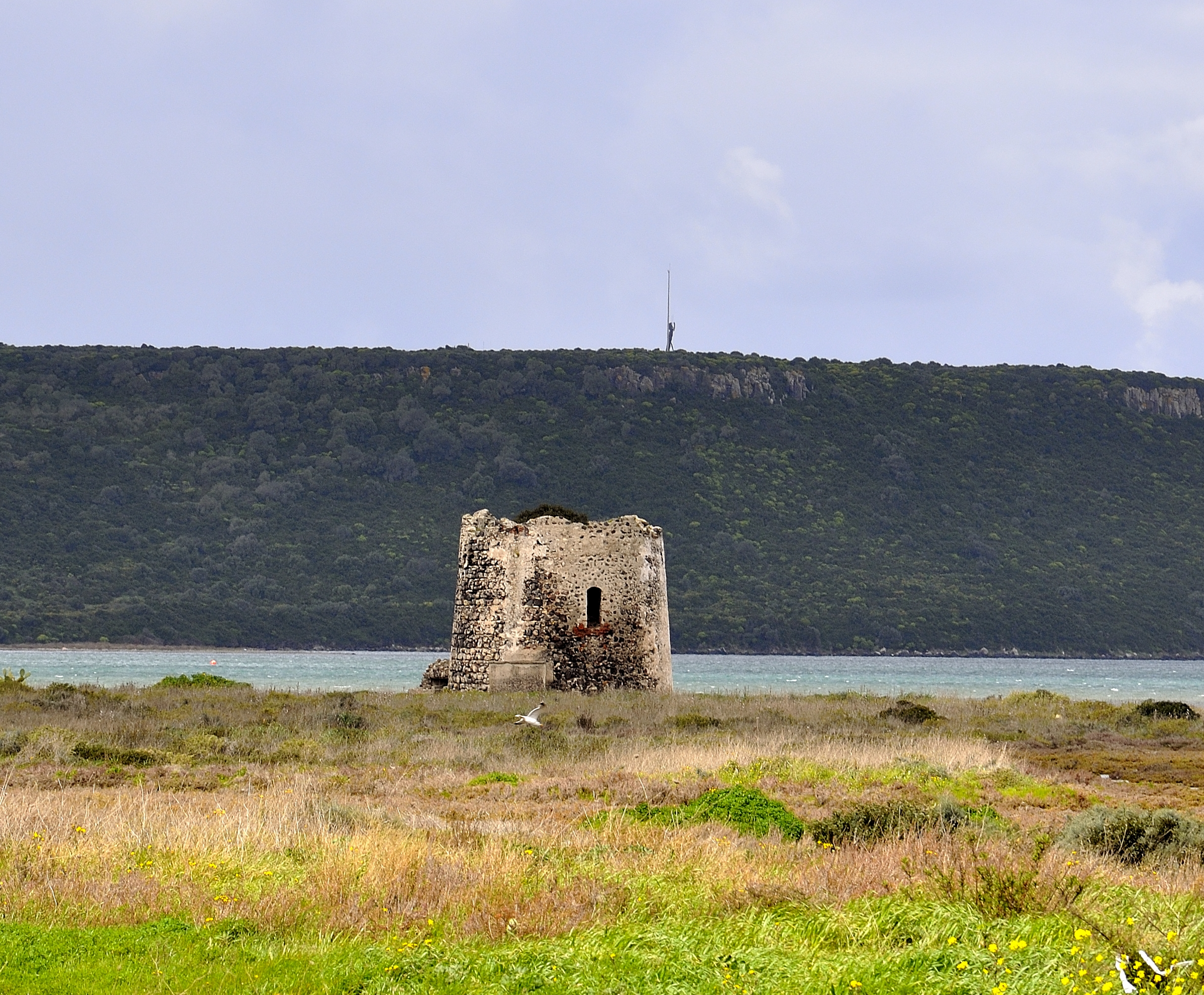 Torre costiera